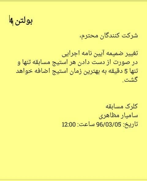 نمونه بولتن مسابقات رالی قهرمانی کشور 1396